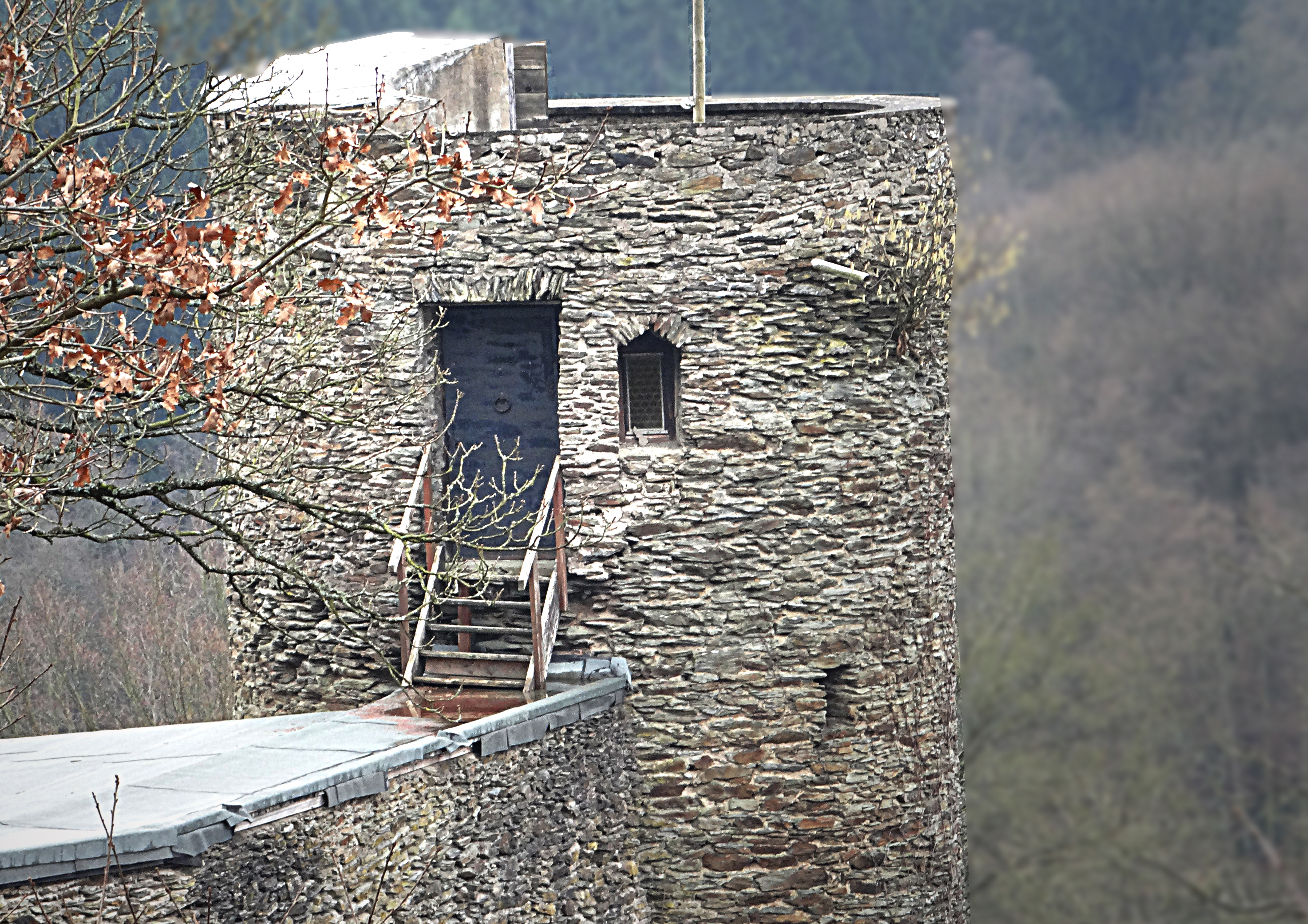 Burgruine Raubritterburg Reichenstein